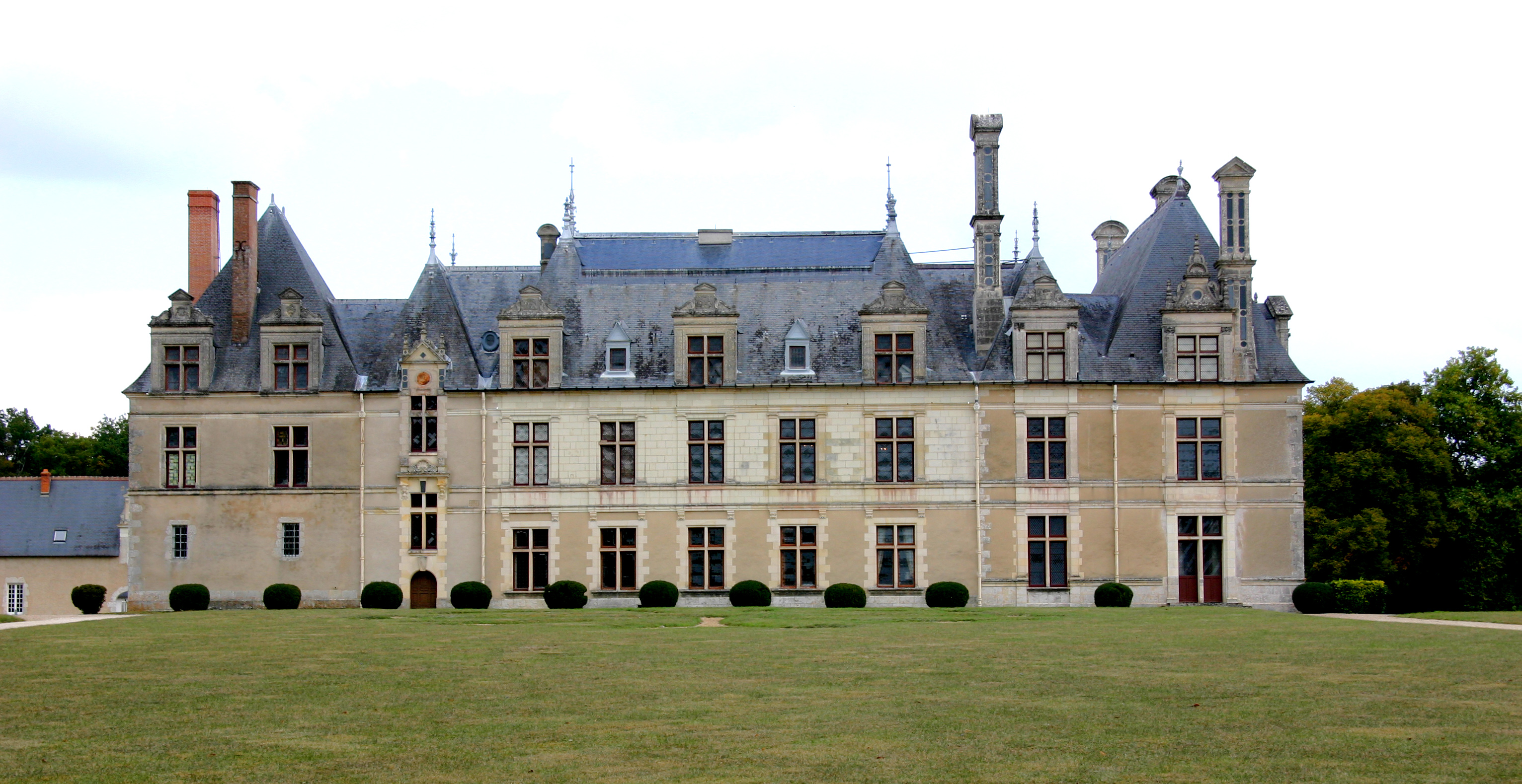 Château de Beauregard